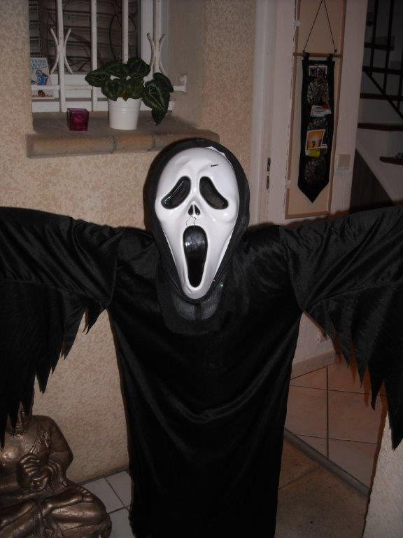 Halloween in Venedig